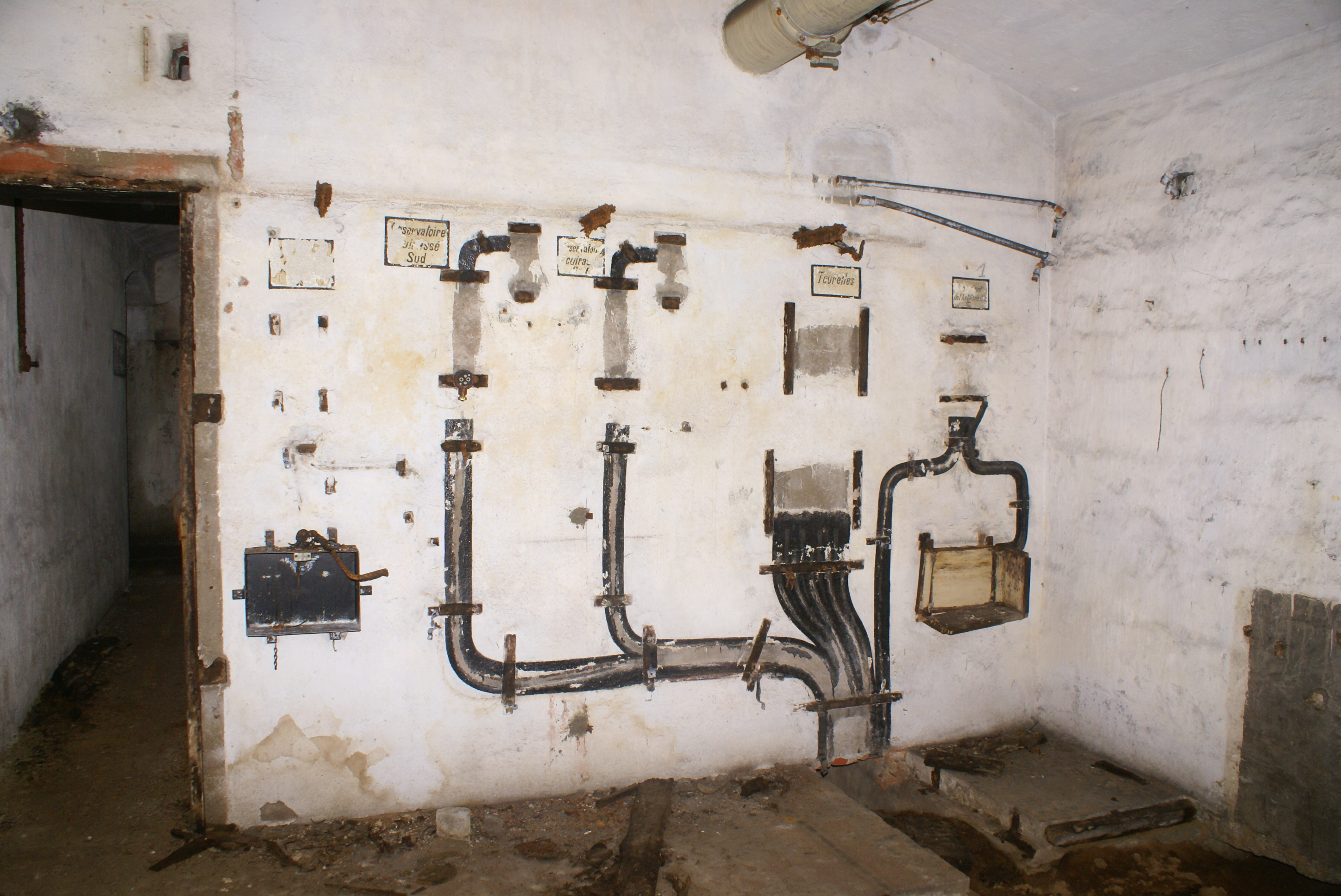 Ancien poste de communication du fort d'Illange